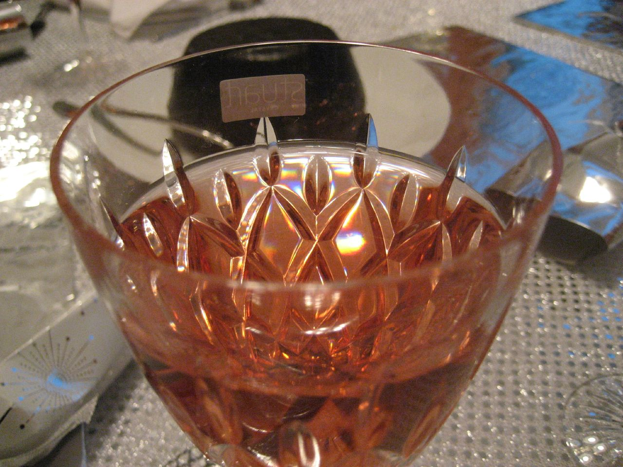 Grenache Rosé wine.